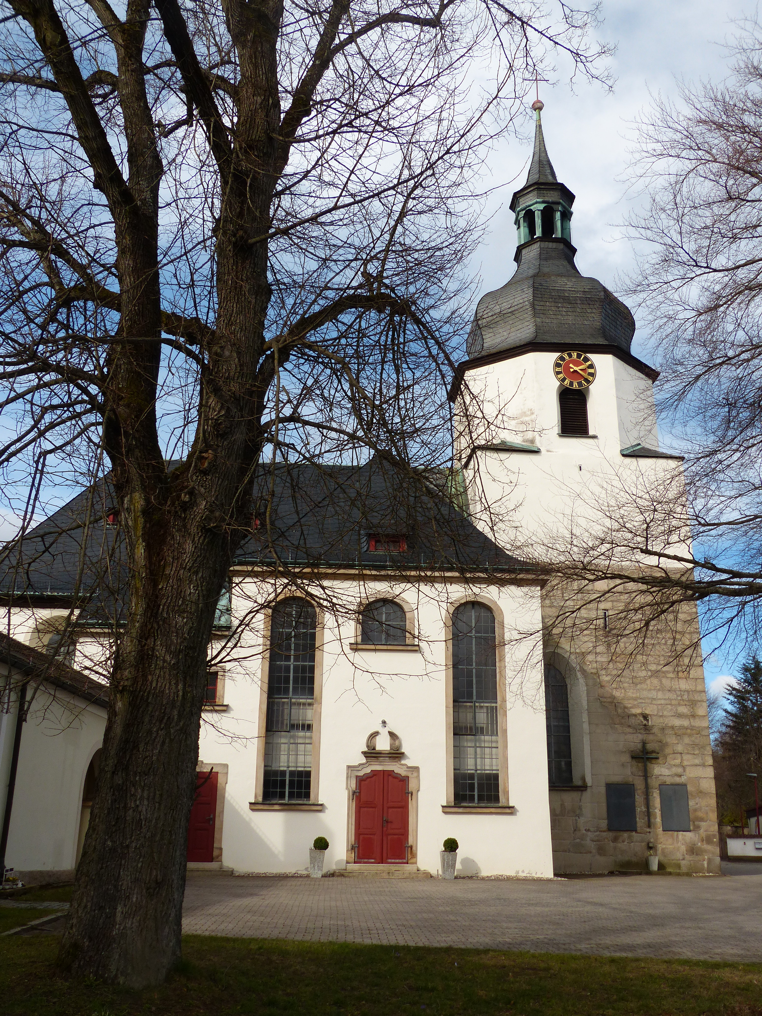 Historische Gebäude u.ä. in Schönwald